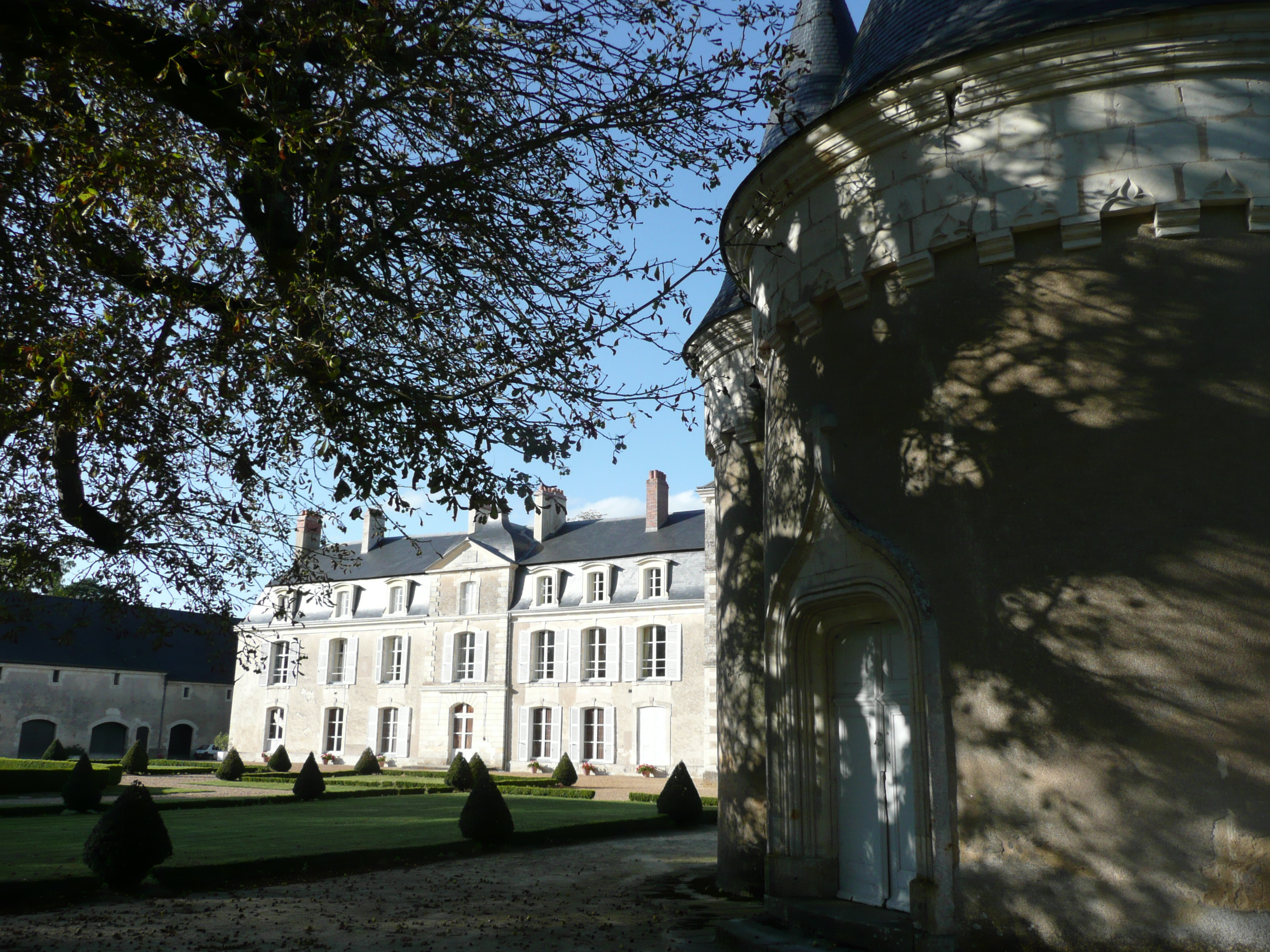 Lasse - Château du Bouchet This building is en partie classé, en partie inscrit au titre des Monuments Historiques. .